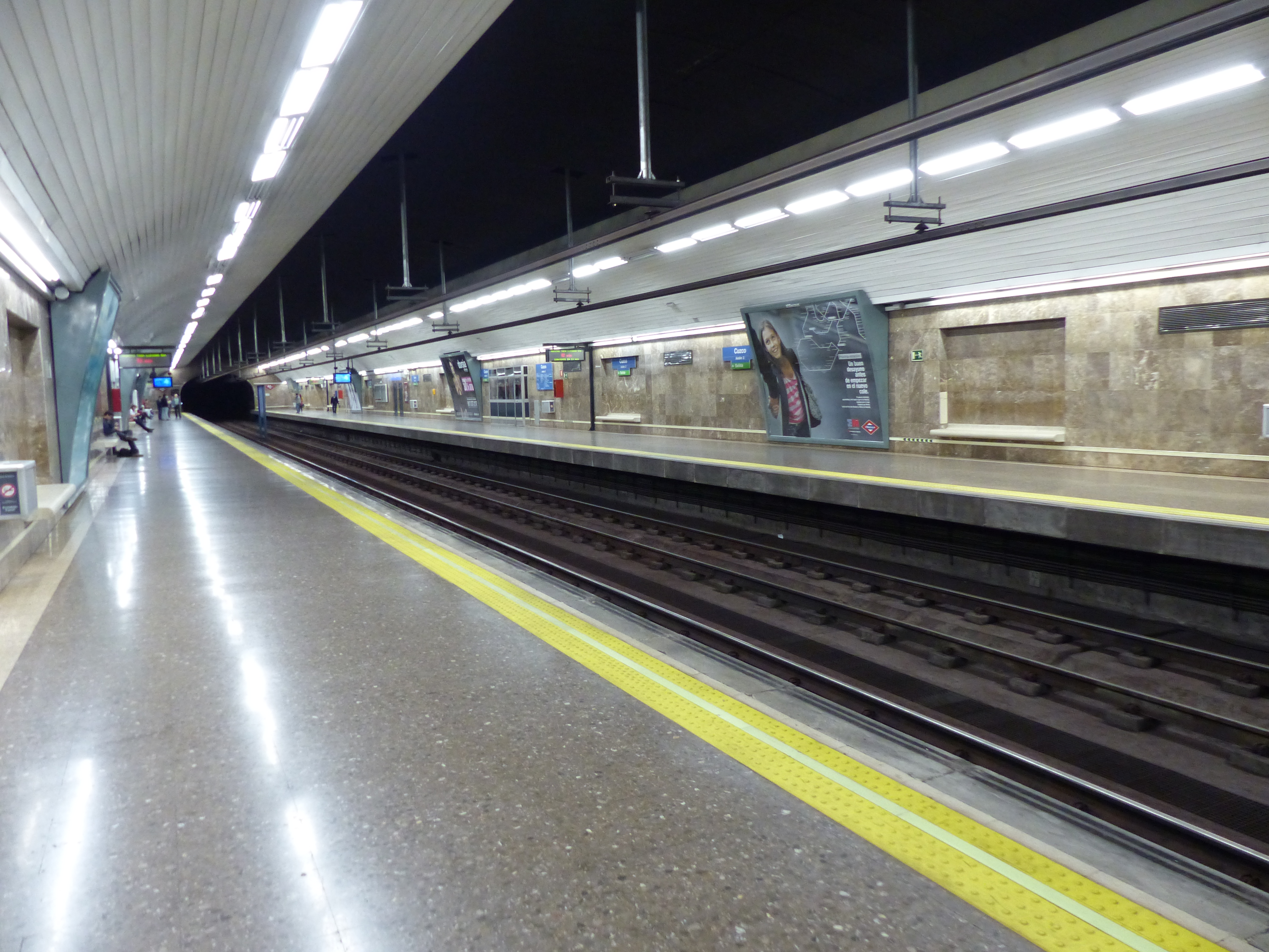 Estación de Cuzco, vista del andén.